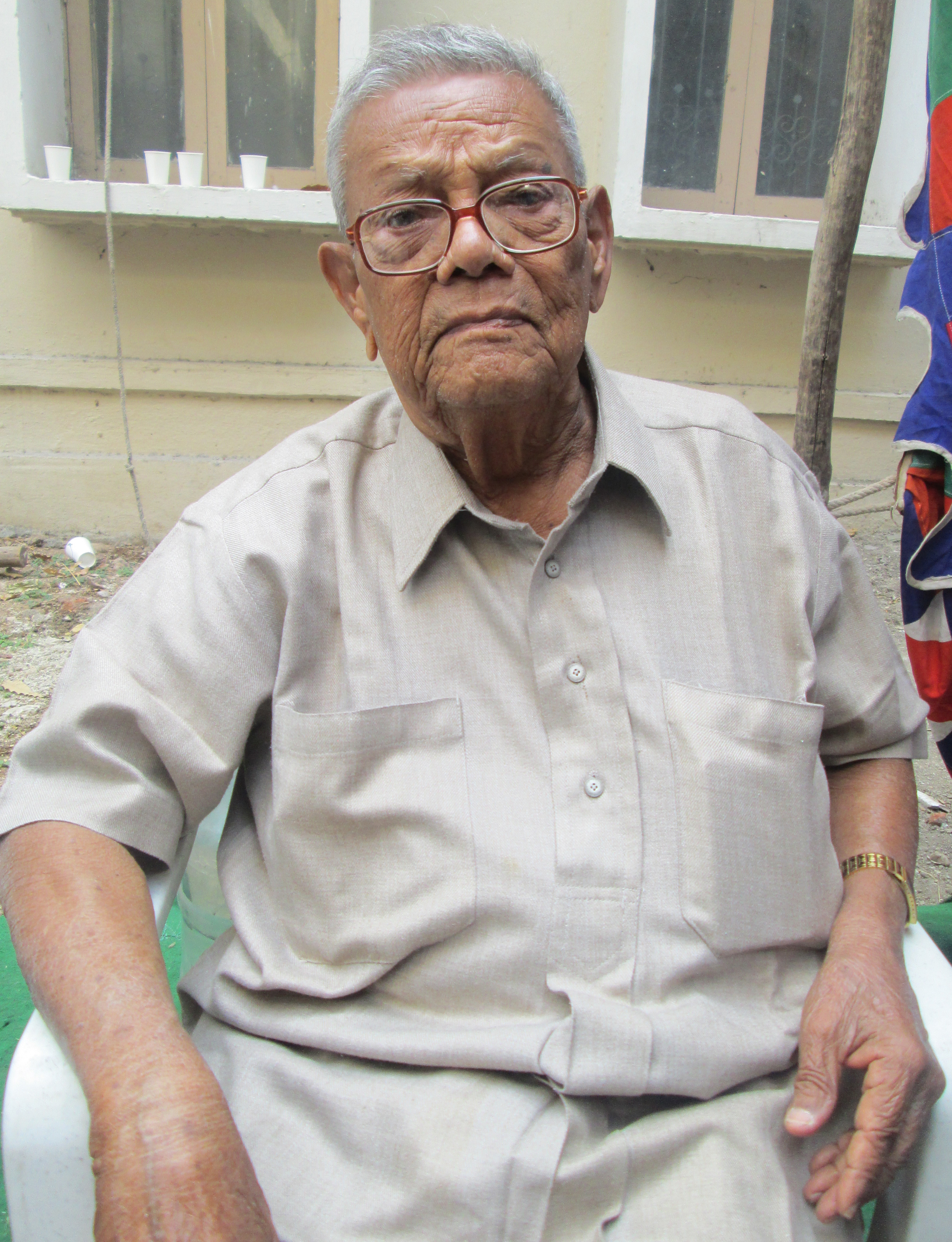 కాళీపట్నం రామారావు